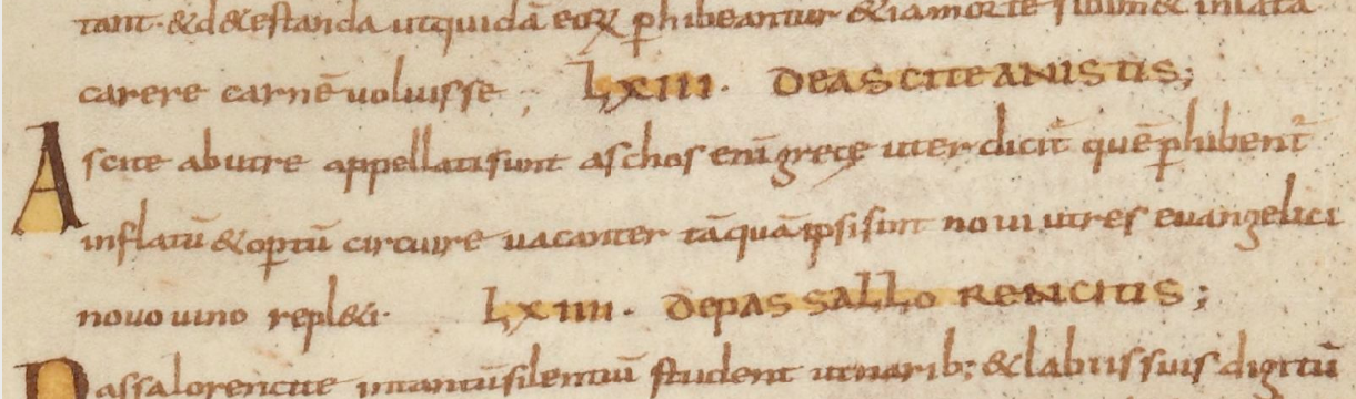 Августин в книге «De Haeresibus ad Quodvultdeum Liber Unus» («Ереси, попущением Бога, в одной книге») о аскитах. «Smaragdus». рукопись IX века.